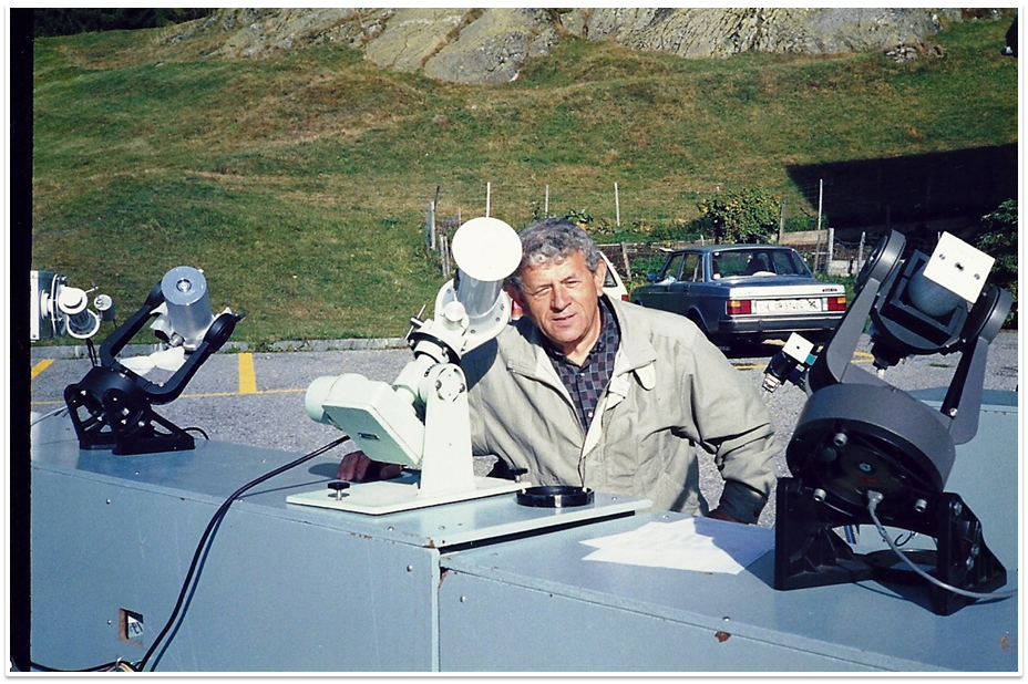 אלכסנדר מנס